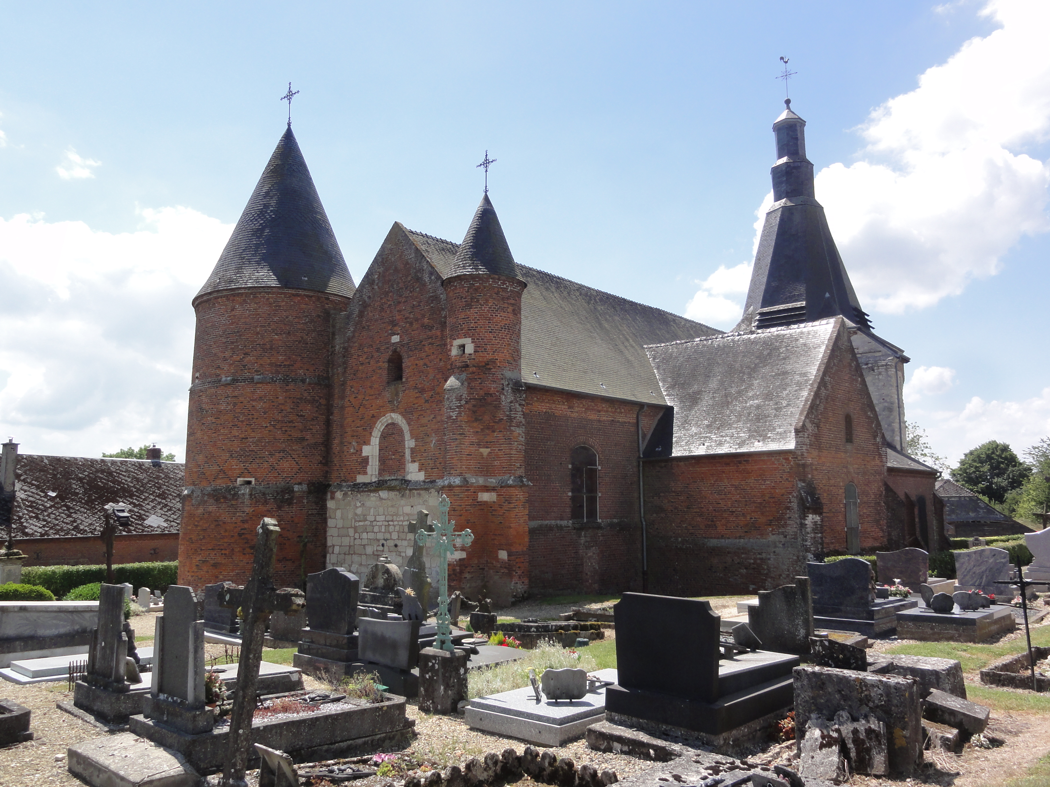 Dohis (Aisne) église, extérieur